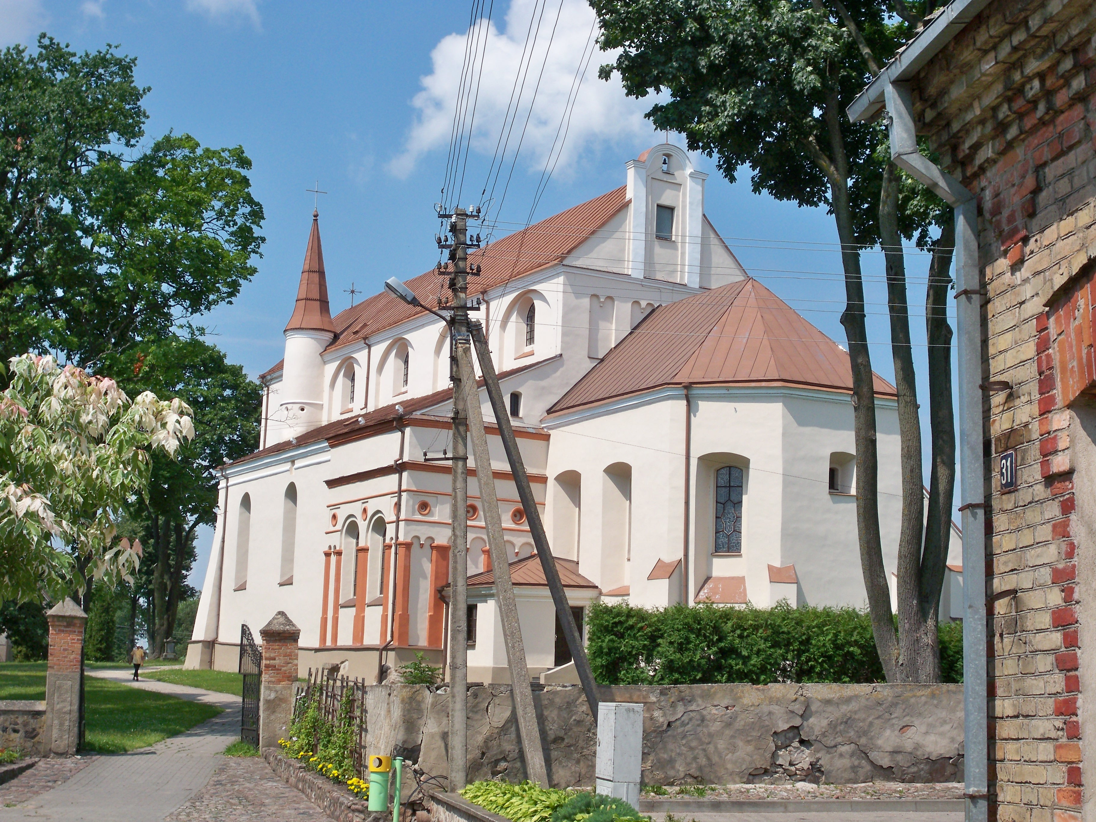 Davvisámegiella: Simnas church.